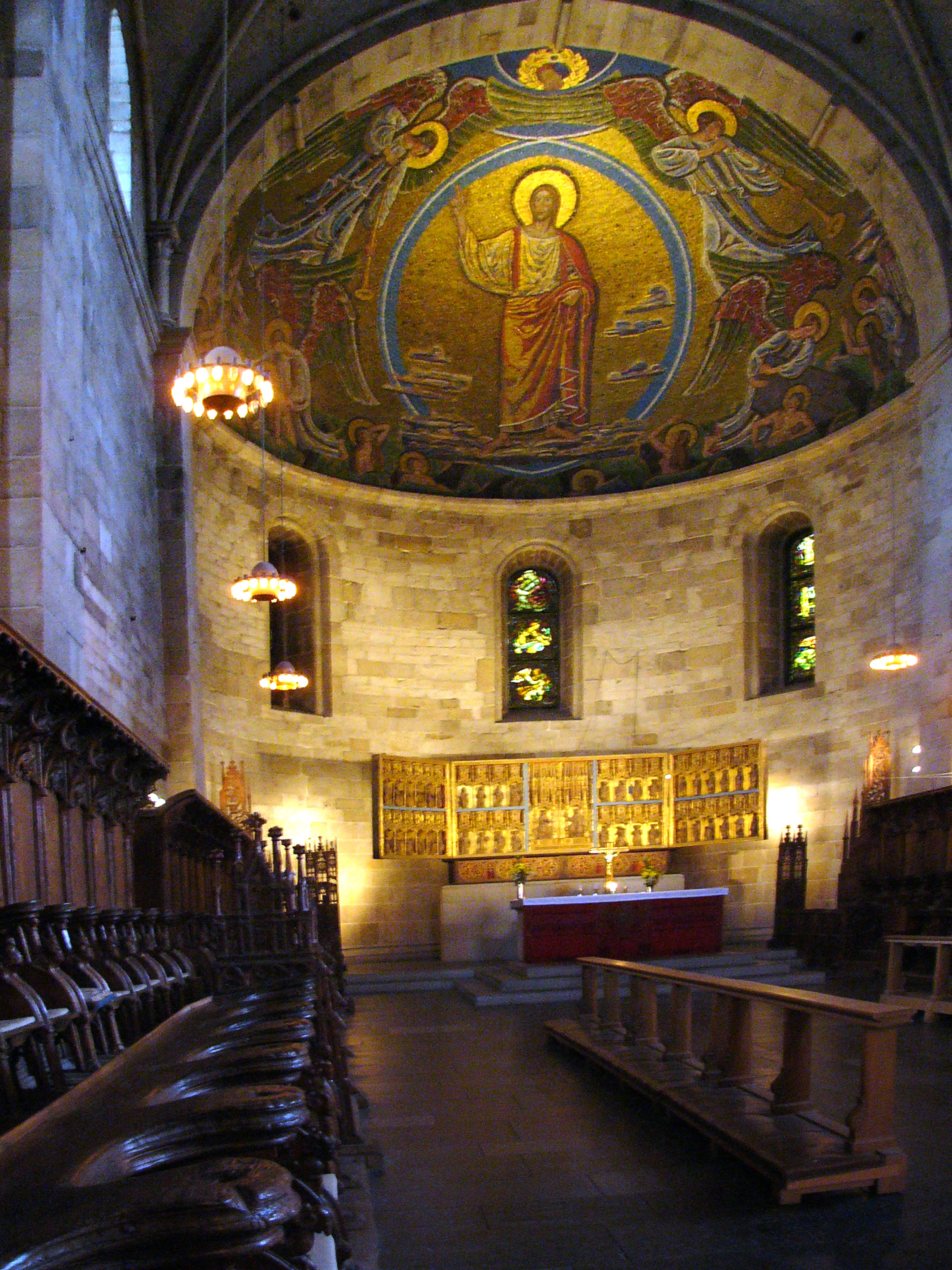 1103/04 errichtete Papst Paschalis II. auf dänische Initiative das Erzbistum Lund. Dom zu Lund. Chorraum mit Apsis.